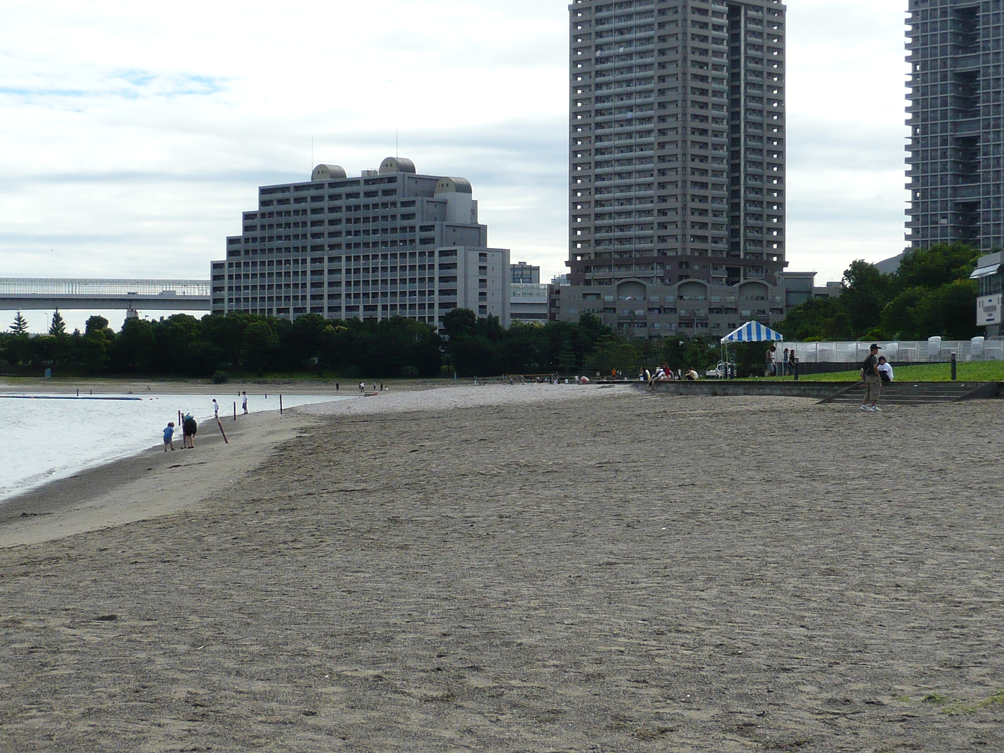 Odaiba Marine Park (odaiba kaihin kouen) in odaiba, Tokyo, Japan.